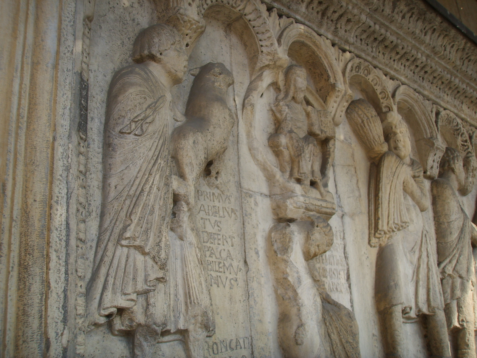 duomo di modena